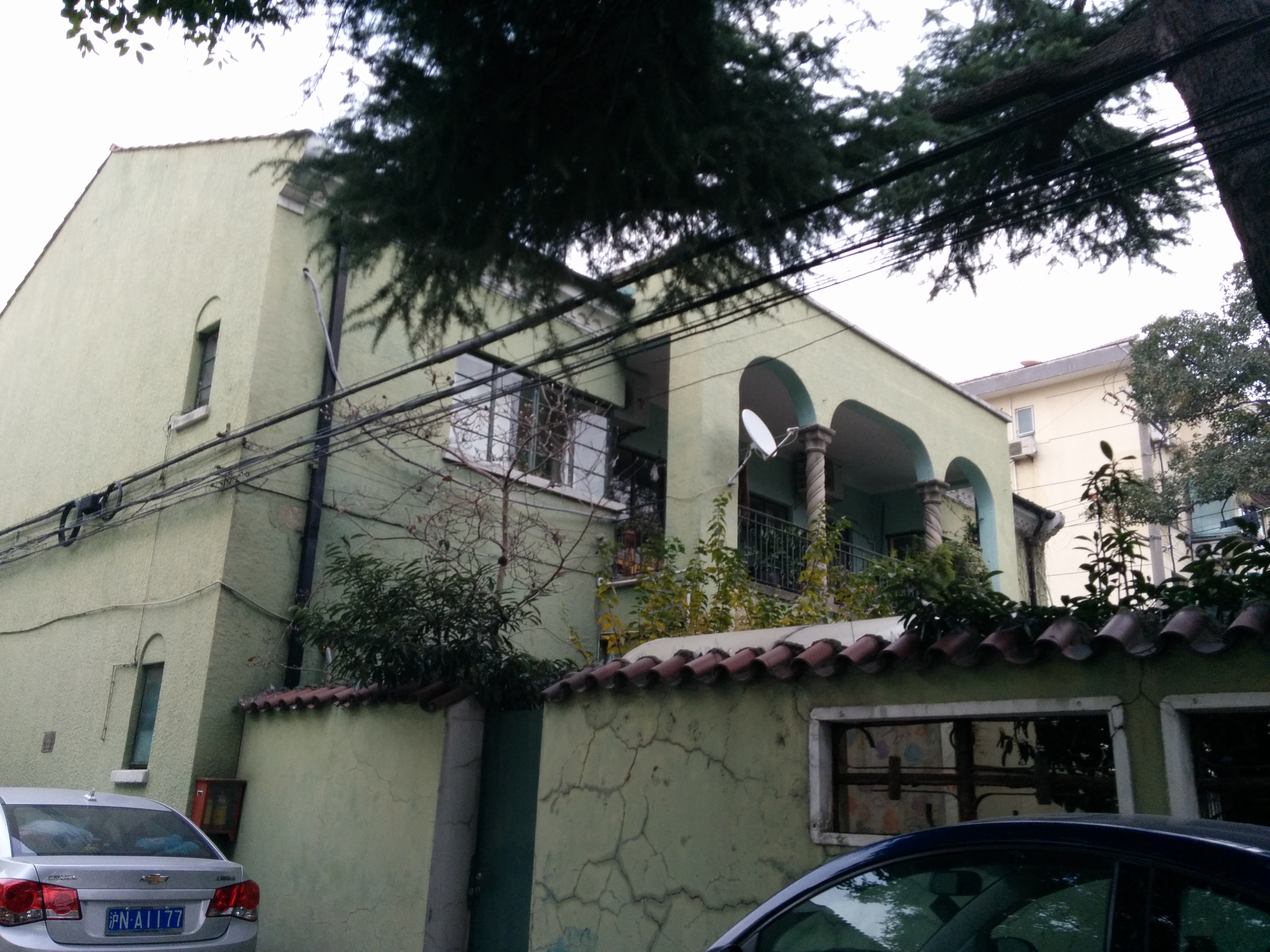 上海新康花园